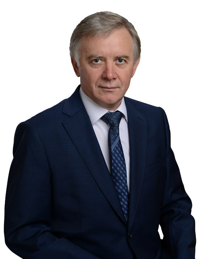 Демусь